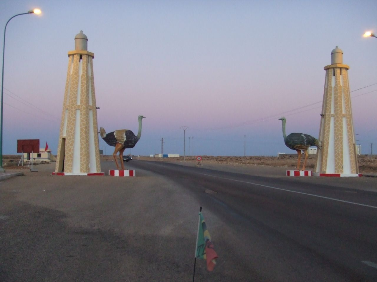 Ruta N1 a la salida de Bojador (Sahara Occidental)